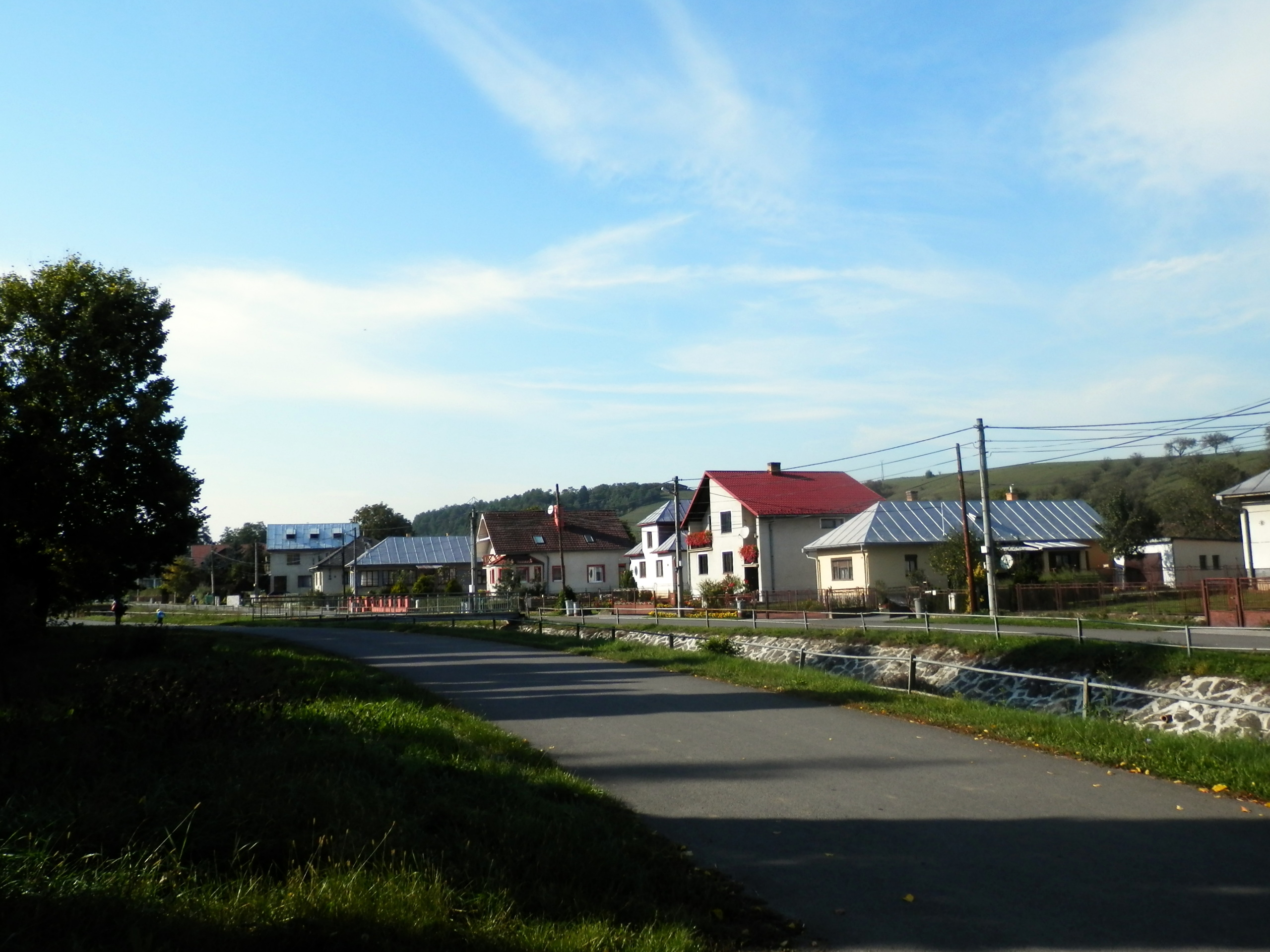 Intravilán obce Kuková, okres Svidník. Slovakia.